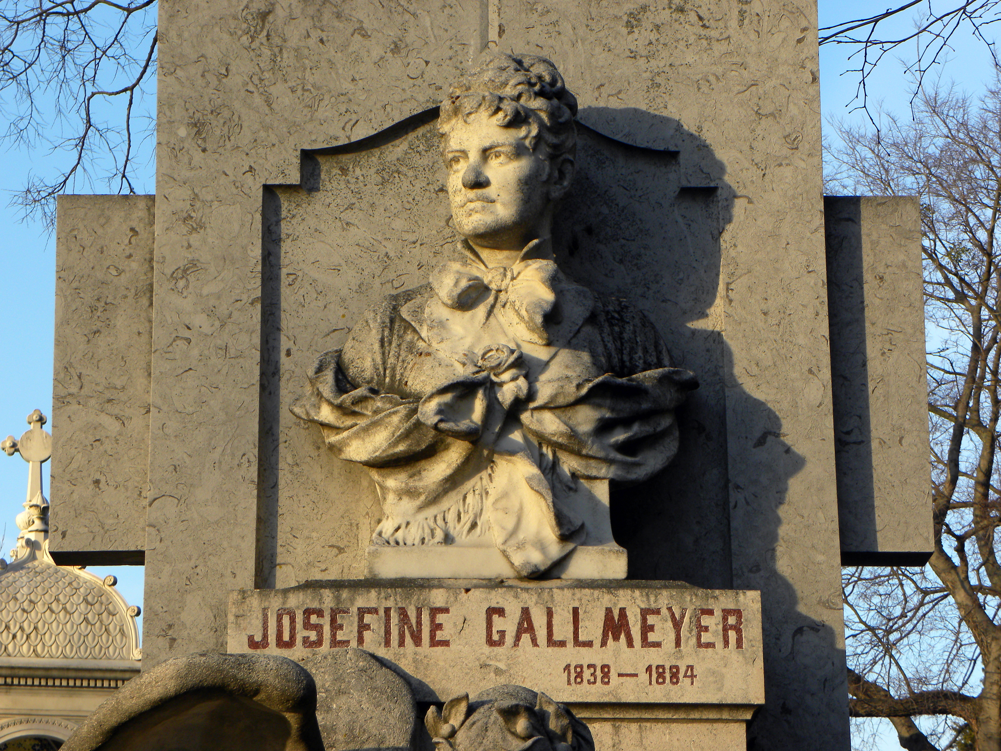 Gesamtanlage, Zentralfriedhof - Grab der Schauspielerin und Theaterdirektorin Josefine Gallmeyer